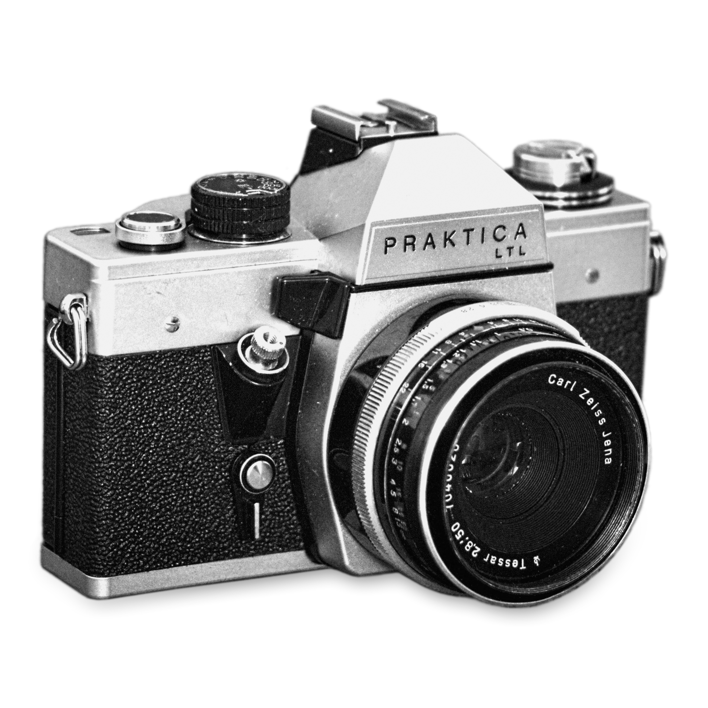 Praktica LTL équipé d'un objectif Carl Zeiss Jena Tessar f2.8 50mm